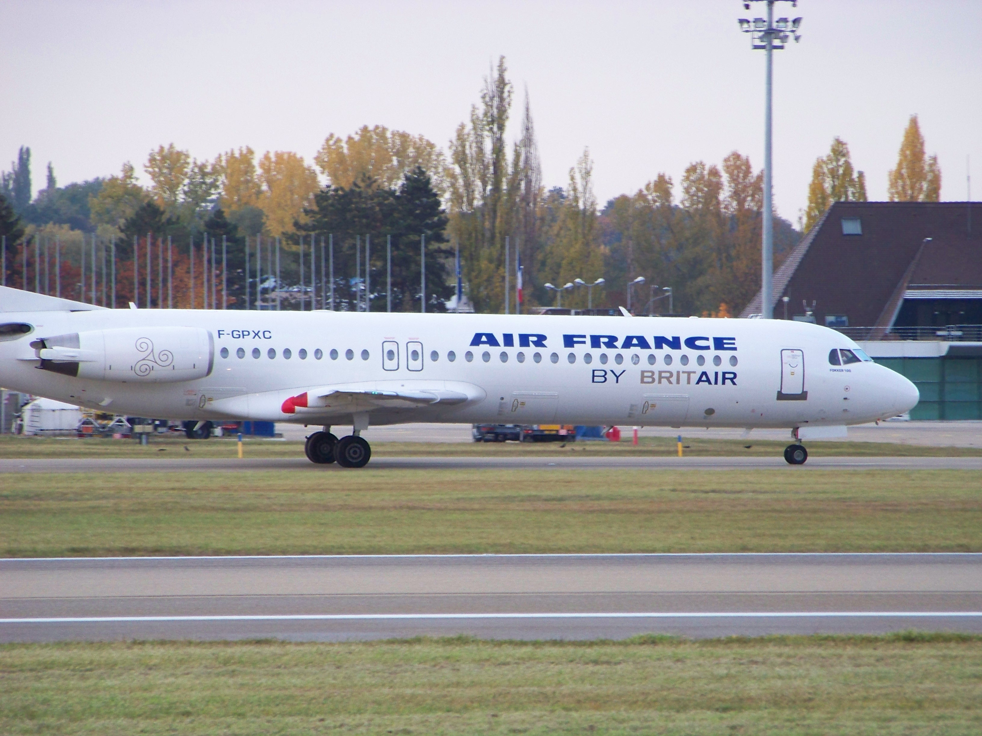 Un avion Britair en 2009